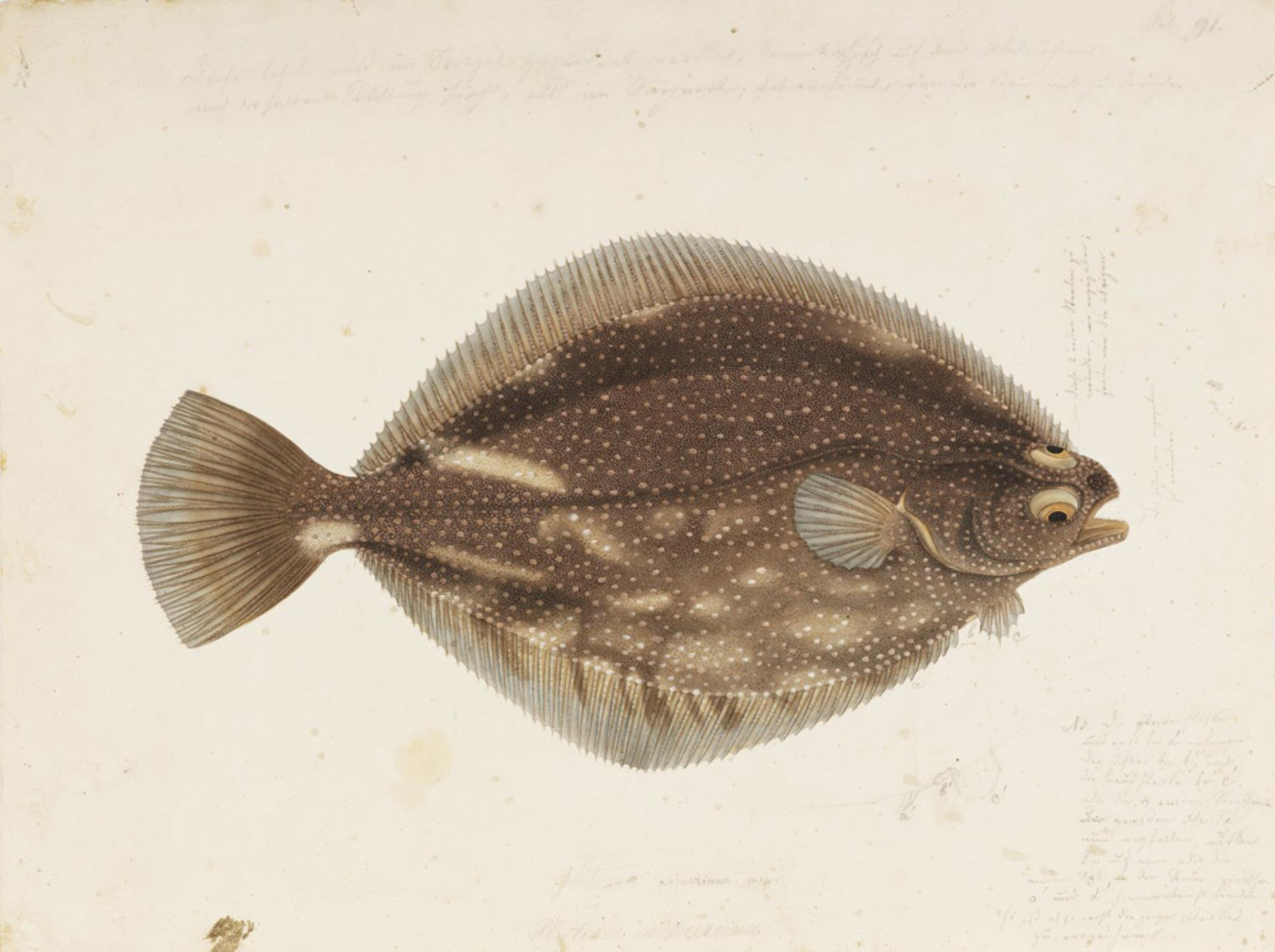 Verasper variegatus (Temminck and Schlegel)